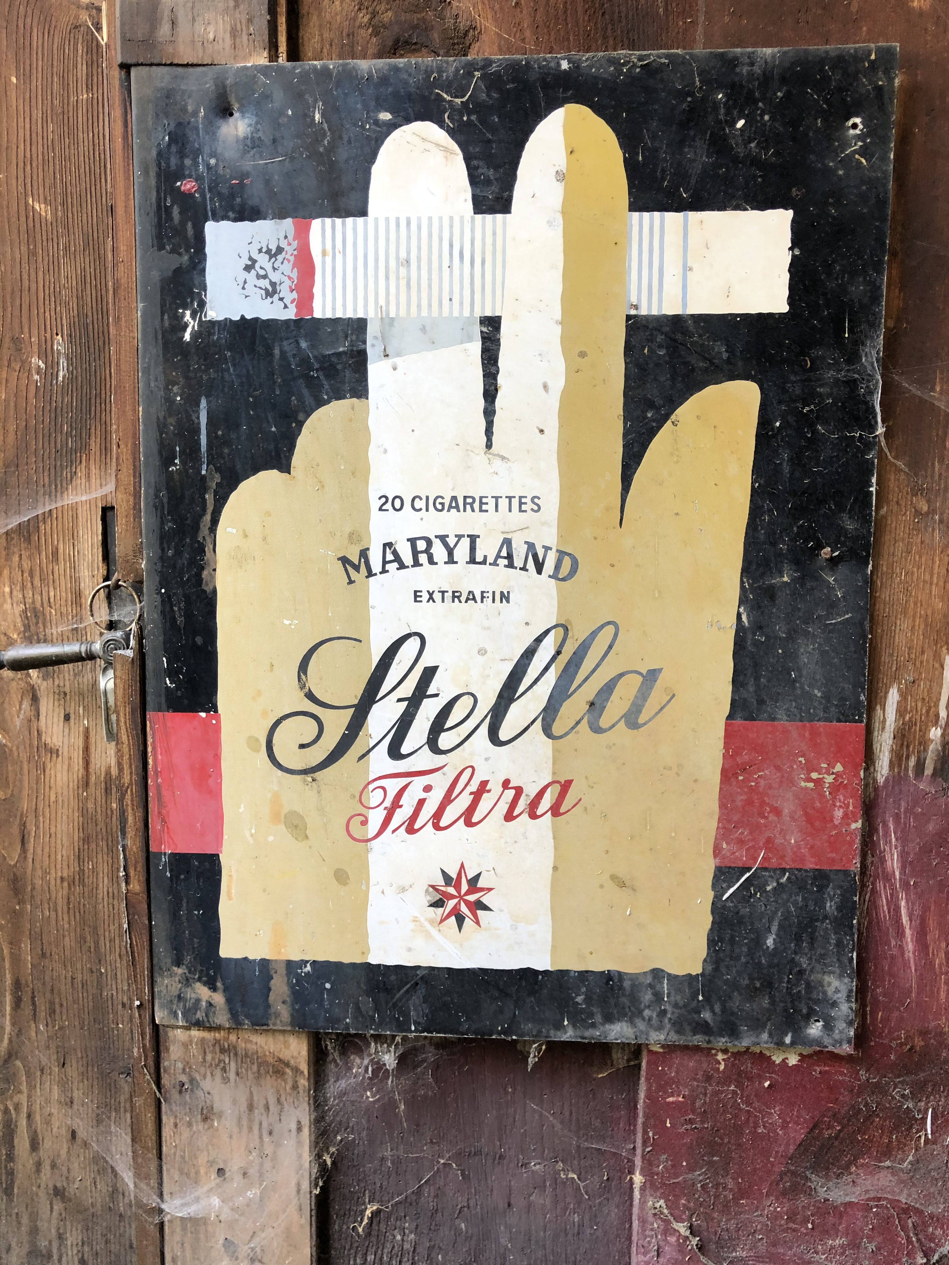 Plakat von Herbert Leupin an einem Haus in Luven